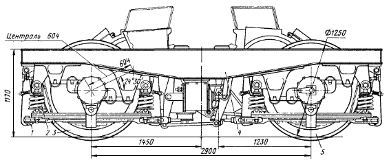 Схема средней тележки электровоза ВЛ85